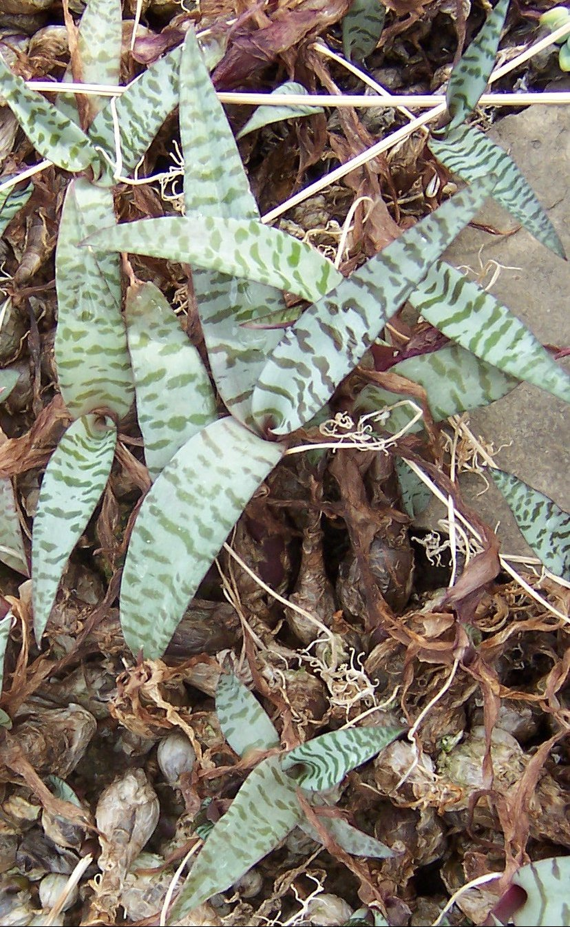 Ledebouria socialis, habitus